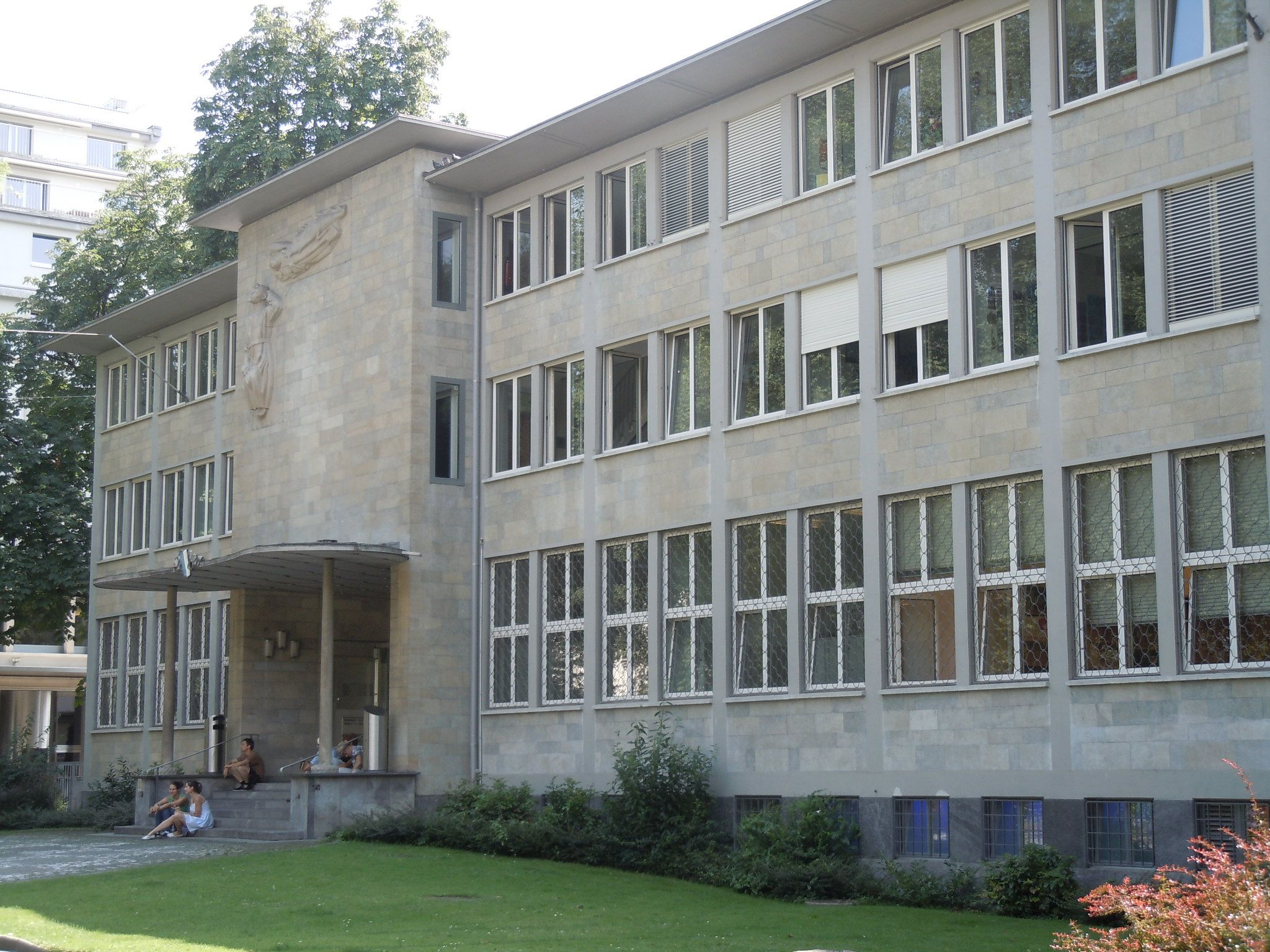 Gebäude der Zentral- und Hochschulbibliothek Luzern, Architekt: Otto Dreyer, 1949-51